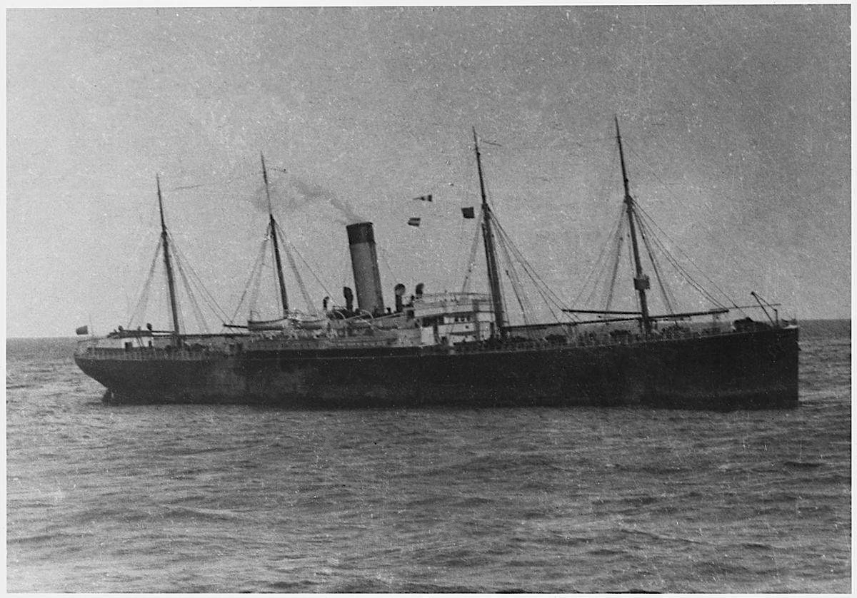 zdjęcie przedstawia statek SS Californian.